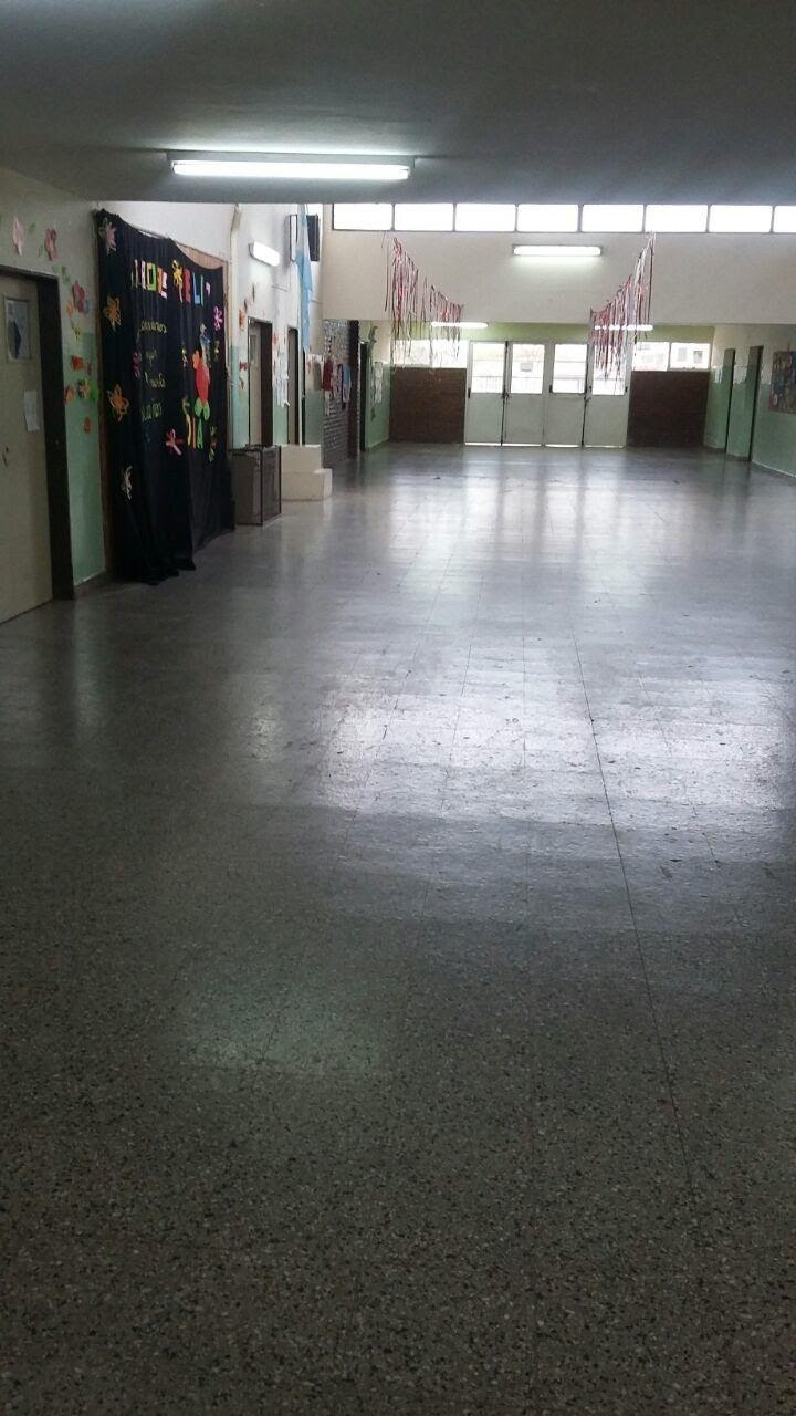 Galería del CENS19